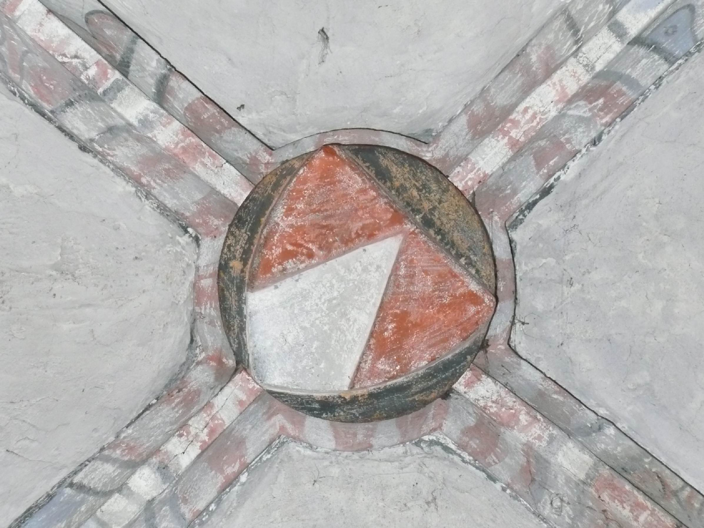 Das Wappen der Familie von Blassenberg als Gewölbeschlussstein in der Ritterkapelle des Klosters Himmelkron, frühes 14. Jahrhundert.